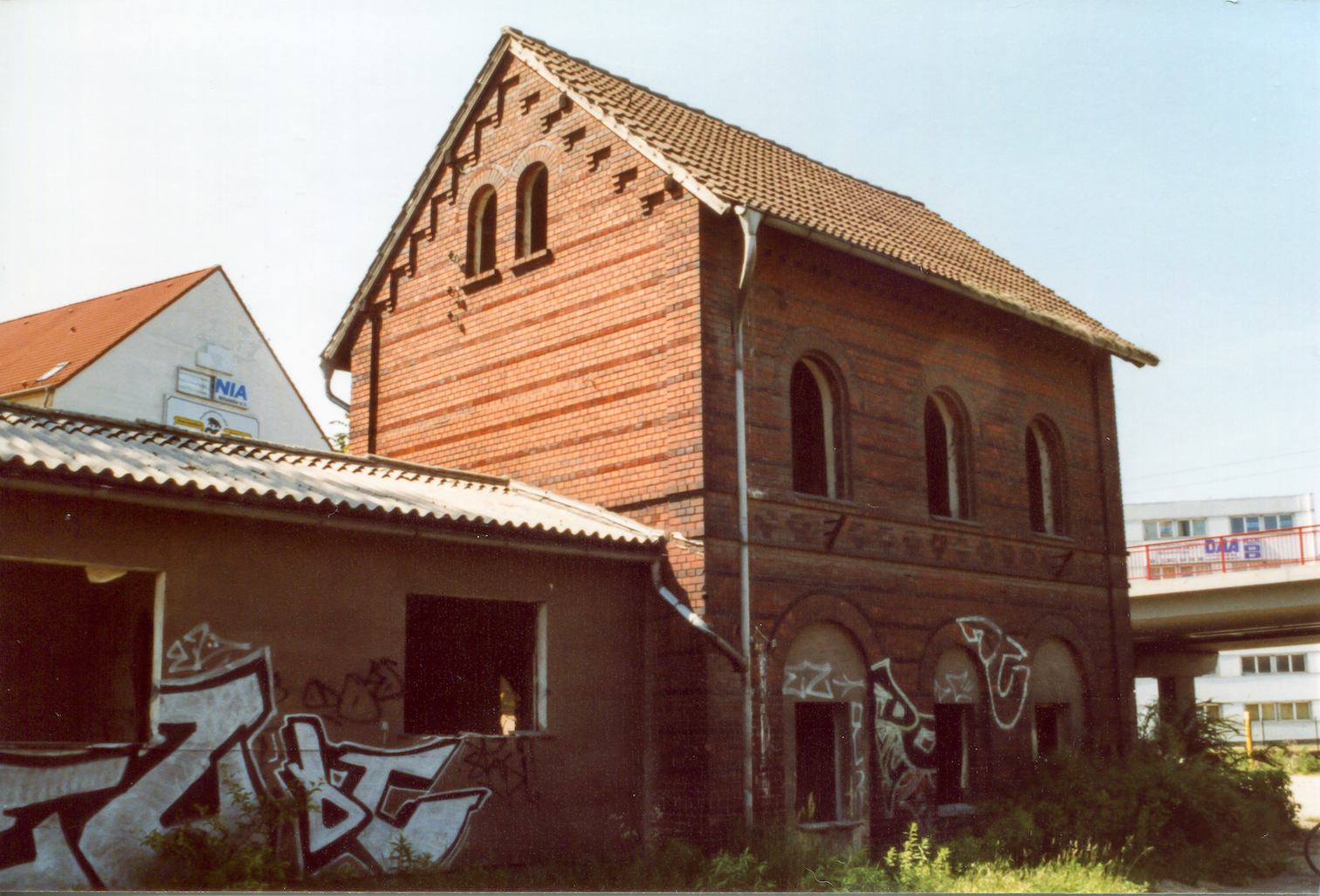 Das Bild zeigt den inzwischen abgerissenen Kleinbahnhof der Dessau-Radegast-Köthener Bahn in Dessau (unterhalb der Brauereibrücke)